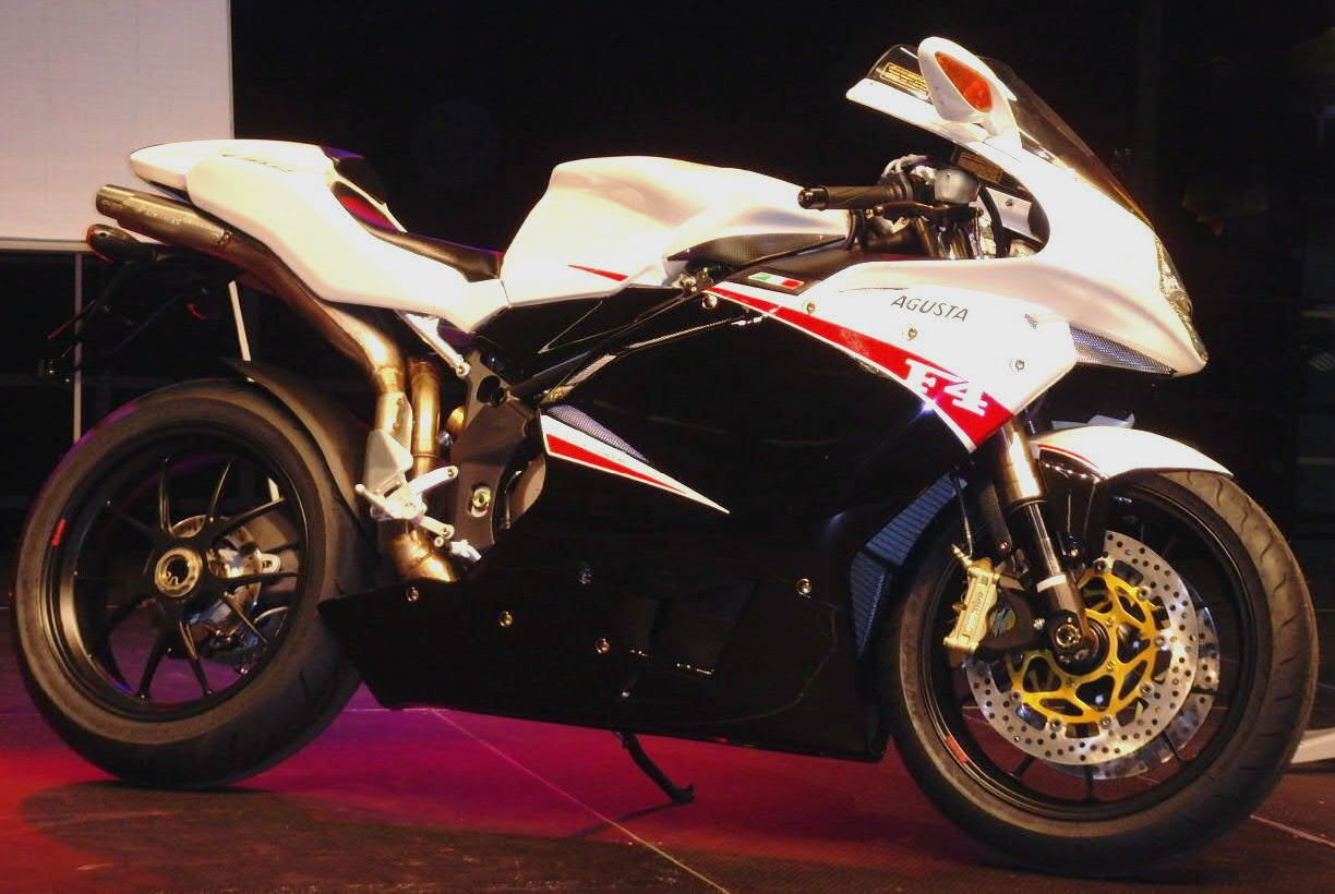 Fasziniation Auto und Motorrad, Mercedes-Benz Kundencenter Rastatt, 6.5.2007